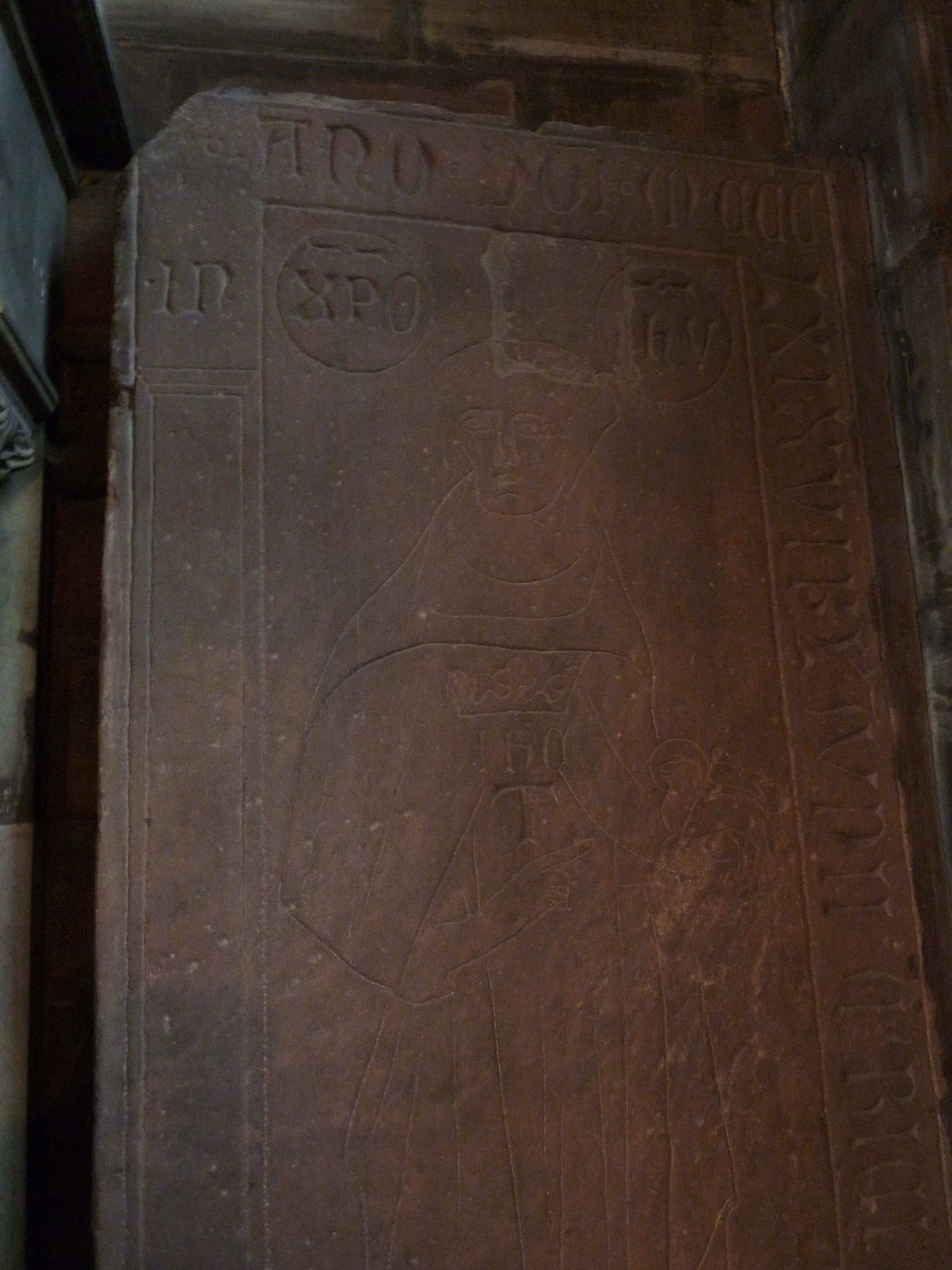 Strasbourg, Temple Neuf : pierre tombale de Jean Tauler